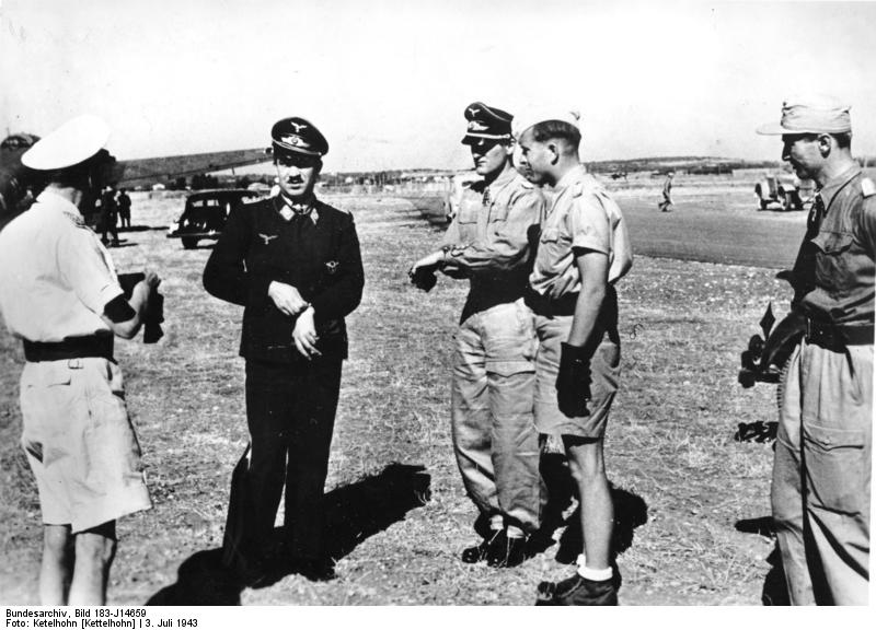 Generalmajor Galland bei seinen Jägern im Süden Der Inspekteur der Jagdflieger, Generalmajor Galland, Träger des Eichenlaubs mit Schwerten und Brillanten (zweiter von links), im Gespräch mit Ritterkreuzträger Generalleutnant Osterkamp (erster von links), Oberst Lützow, Träger des Ritterkreuzes mit Eichenlaub und Schwerten (dritter von links) und Eichenlaubträger Geschwaderkommodore Oberstleutnant von Maltzahn (zweiter von rechts). PK-Kriegsberichter Ketelhohn 3.7.1943